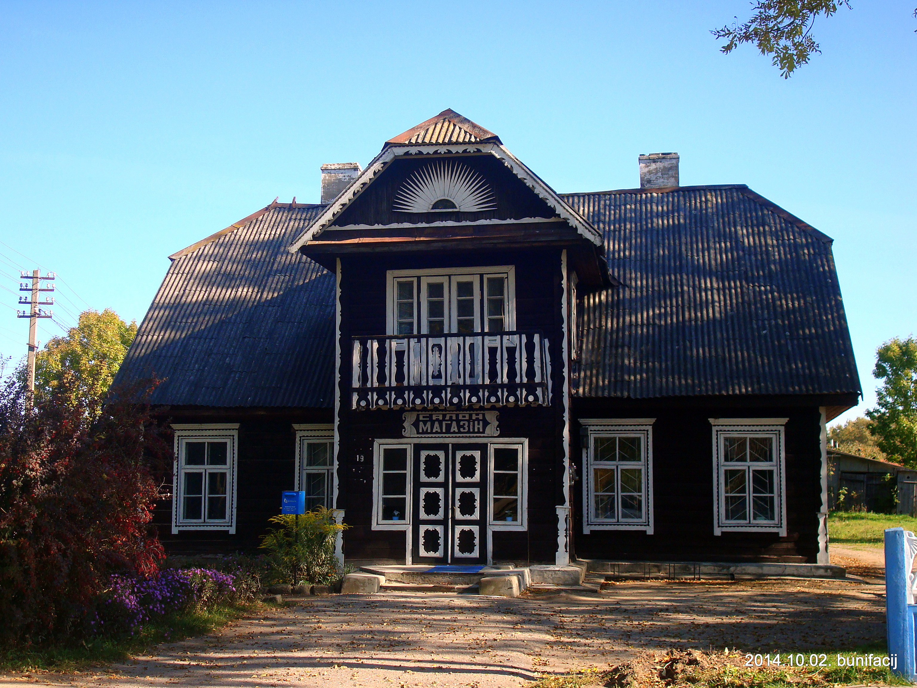 Старый дом в Подсвилье